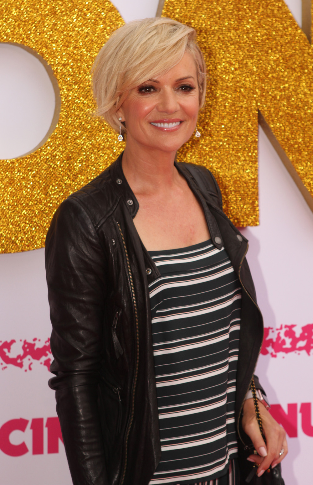 Sandra Sully